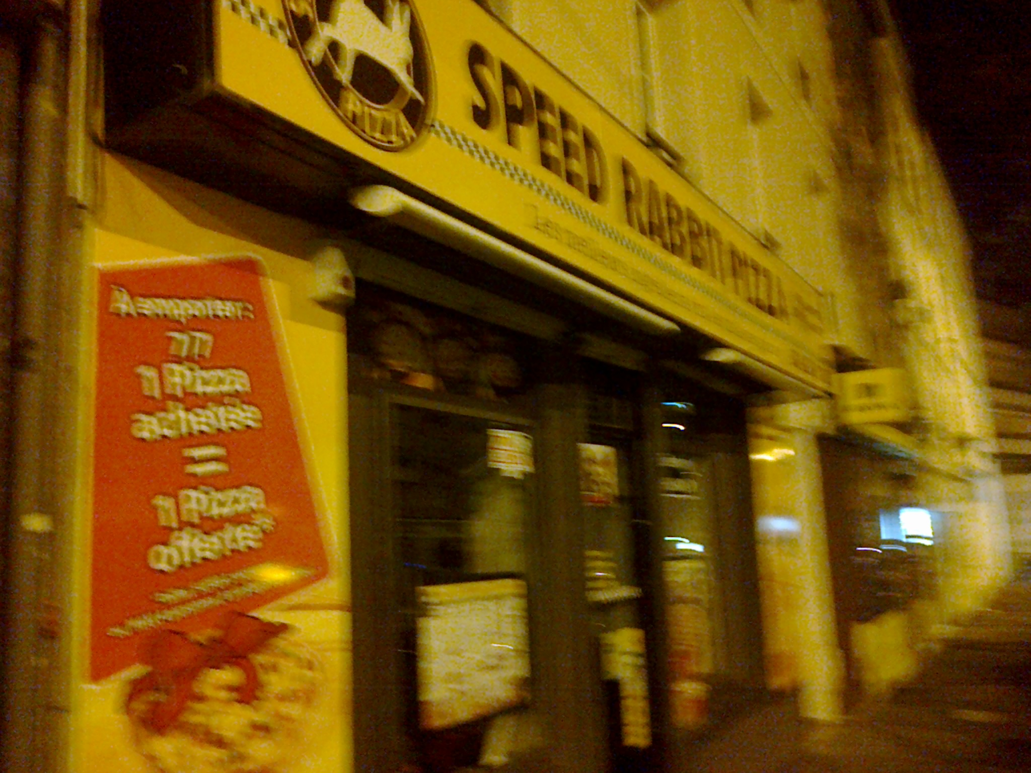 Restaurant Speed Rabbit Pizza à Chaville